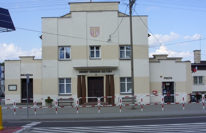 Biblioteka, Gminny Ośrodek Kultury i placówka Poczty Polskiej, przy ulicy Lwowskiej w Bełżcu.